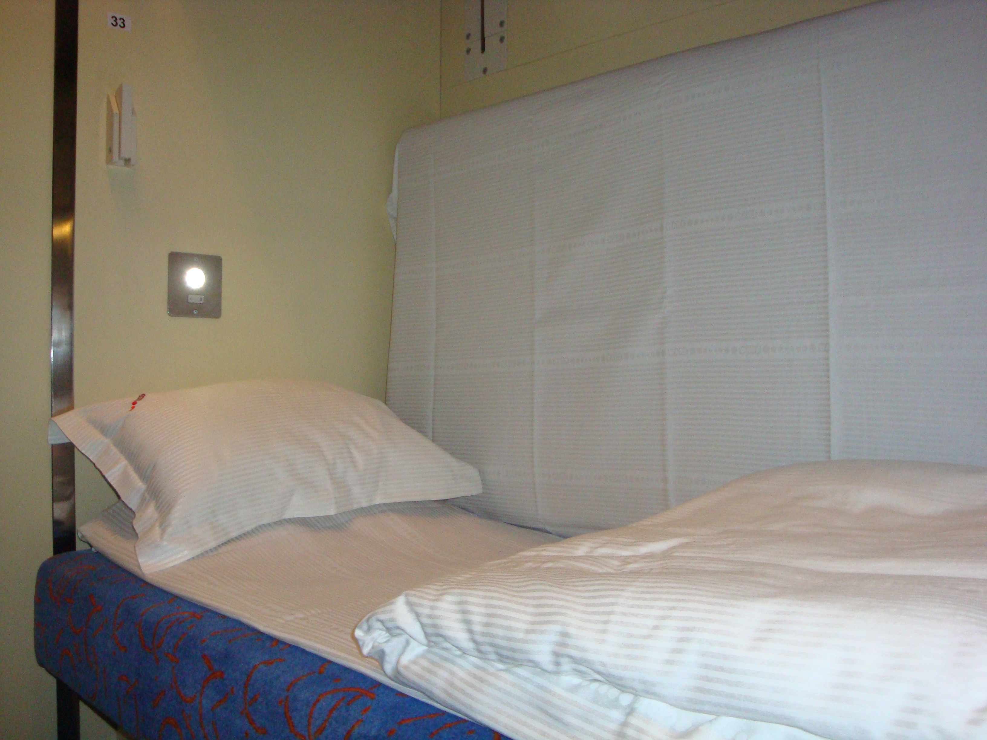 Przedział sypialny w 1-miejscowej aranżacji.